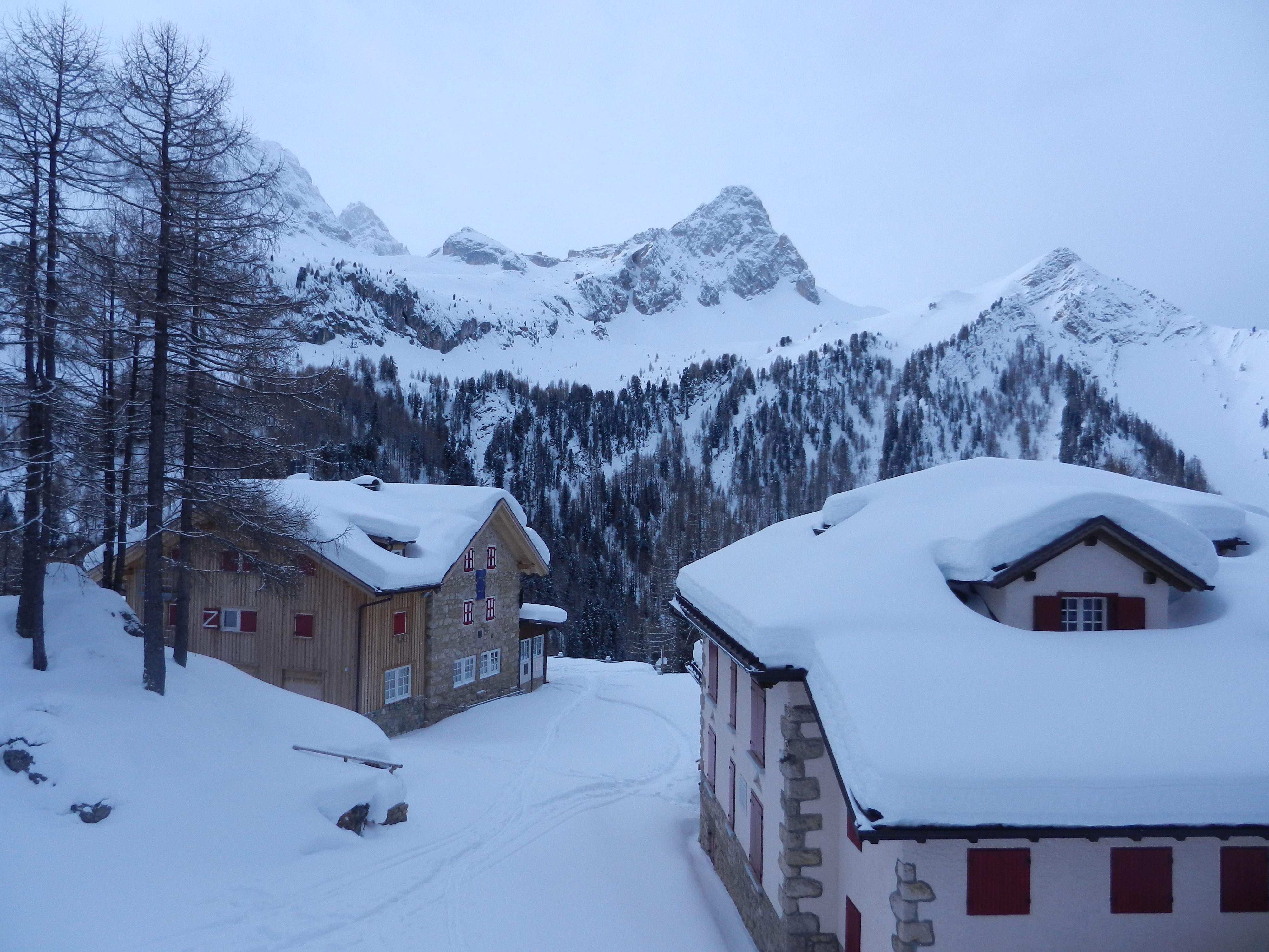 Rifugio Contrin in abito bianco